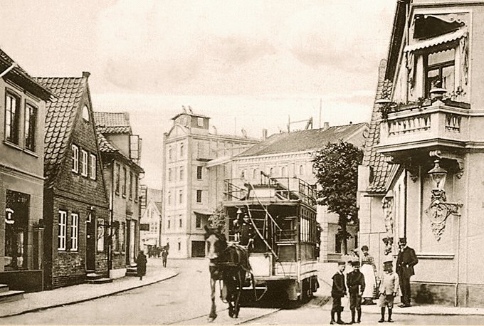 Pferdebahn in Uetersen um 1900 Horse-tramway in Uetersen, Germany about 1900